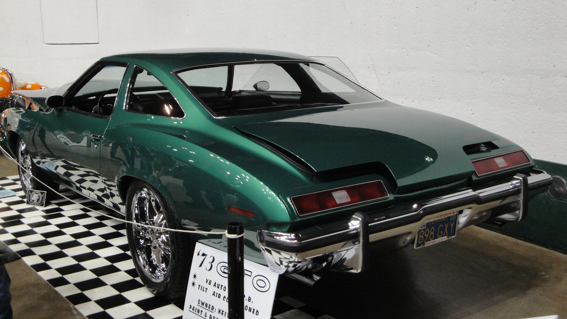 73 Pontiac Lemans